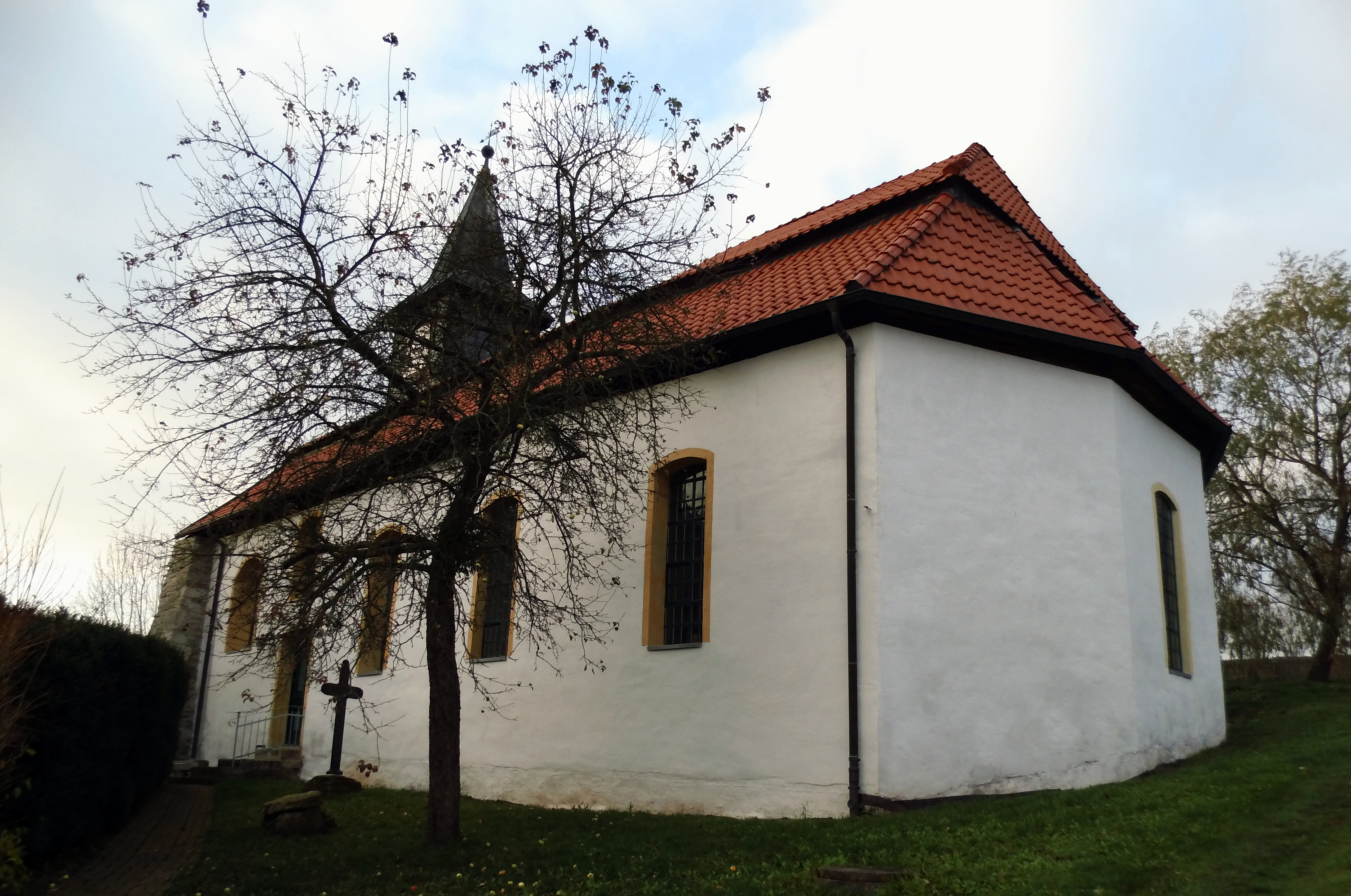 Kirche in Limlingerode - hier wurde Sarah Kirsch getauft. Foto: Holger Zürch